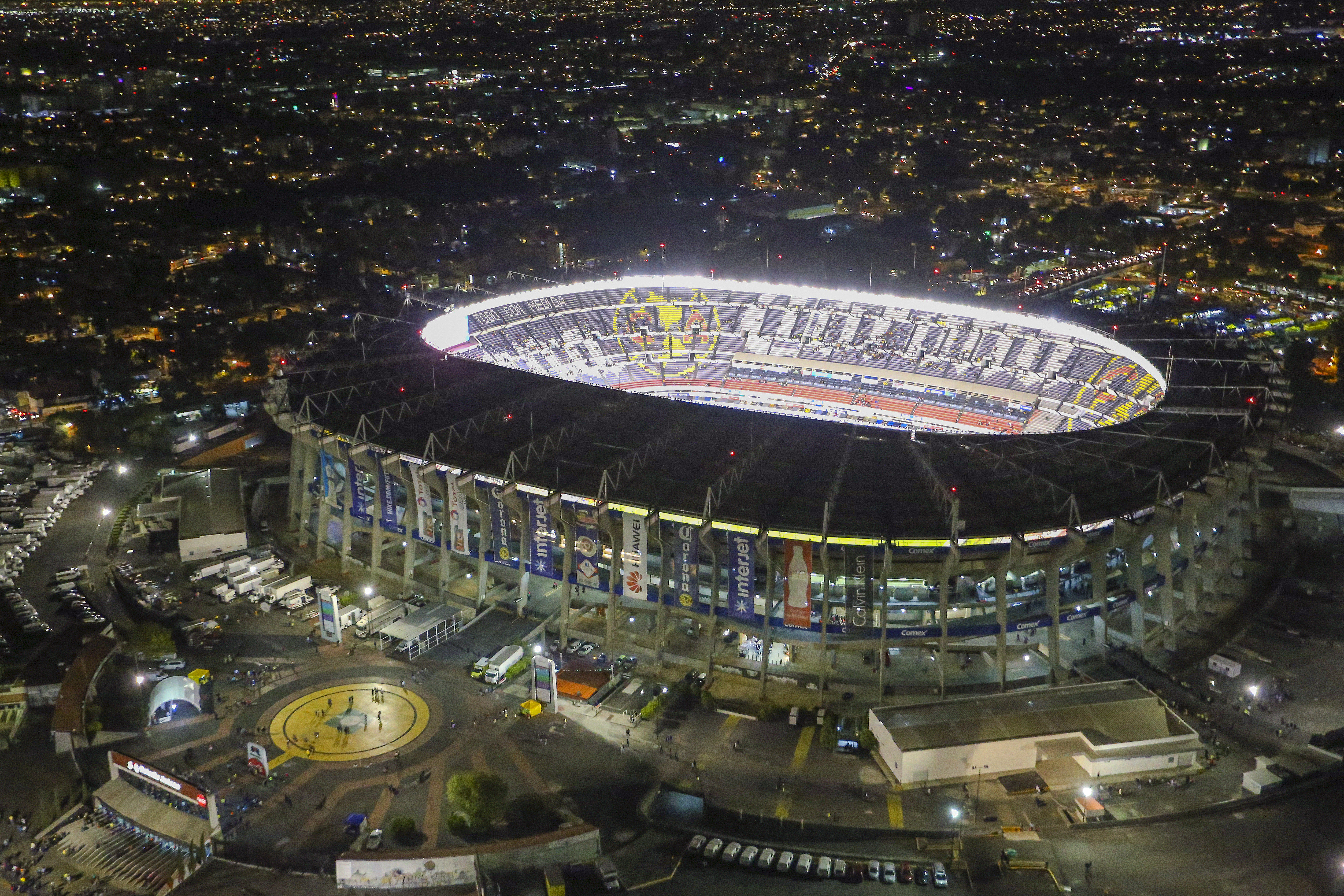 Fotografías de la Ciudad de México desde el aire.